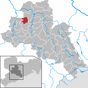 Geringswalde in Saxony - district Mittelsachsen